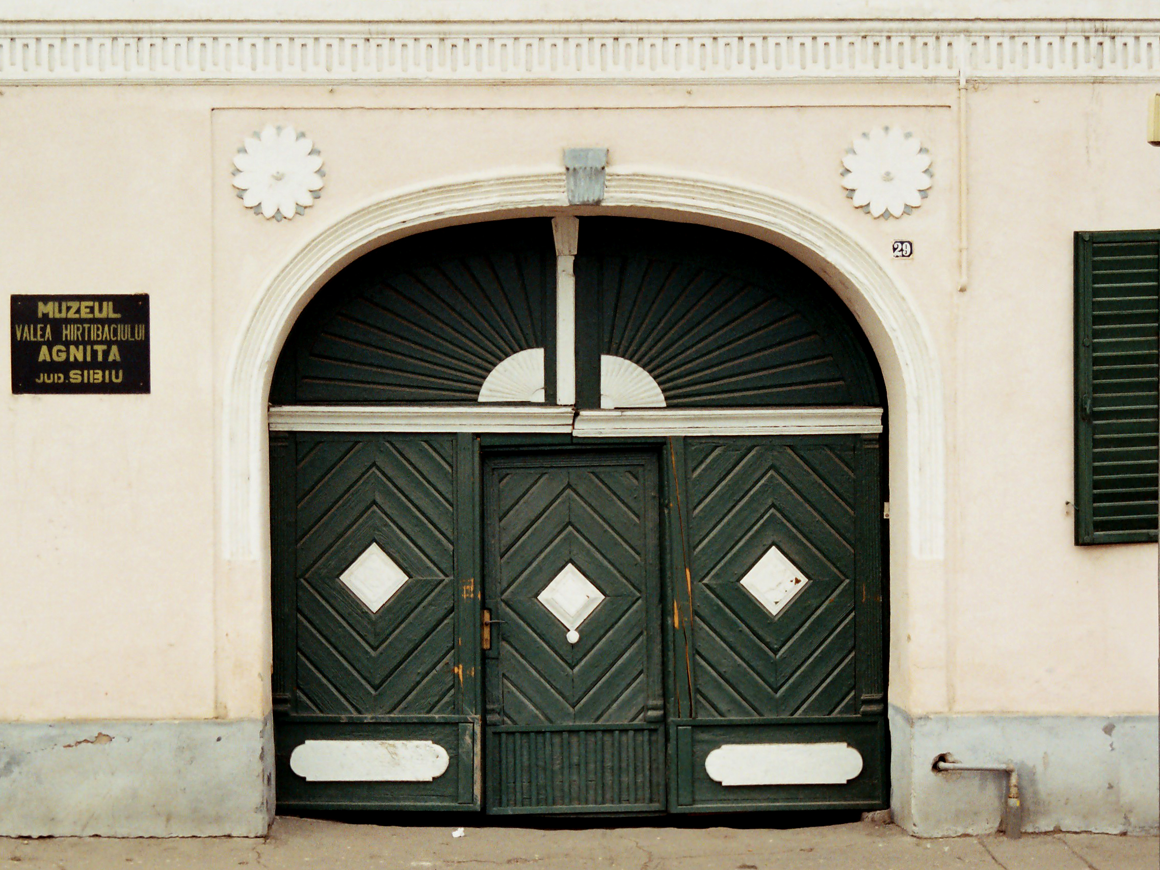 Agnetheln Harbachtalmuseum